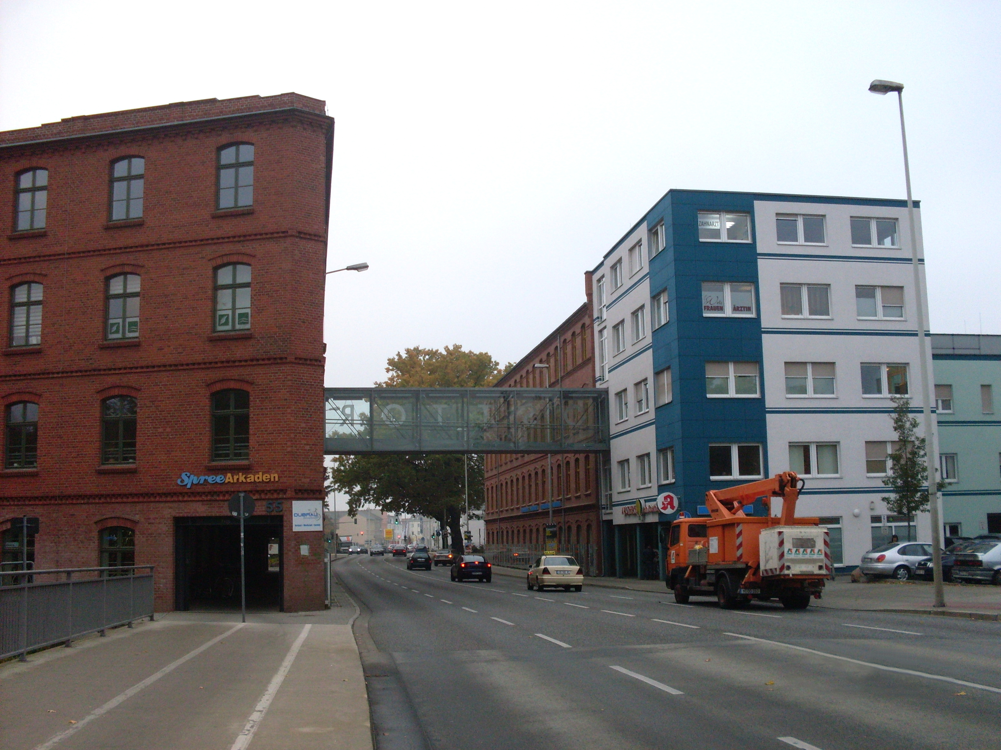 Franzmehring str 55,61